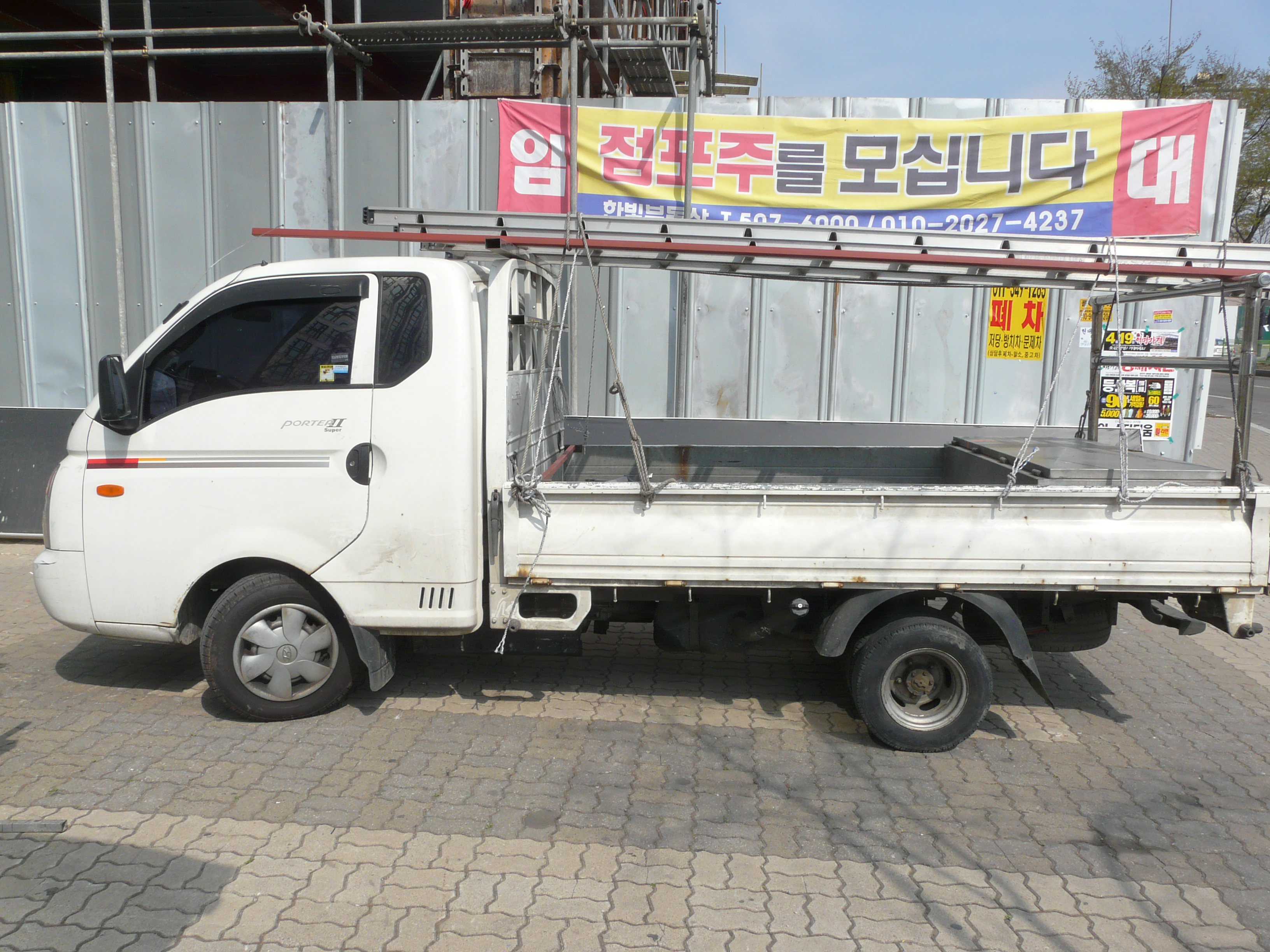 Vehicles in Ansan, Gyeonggi-do